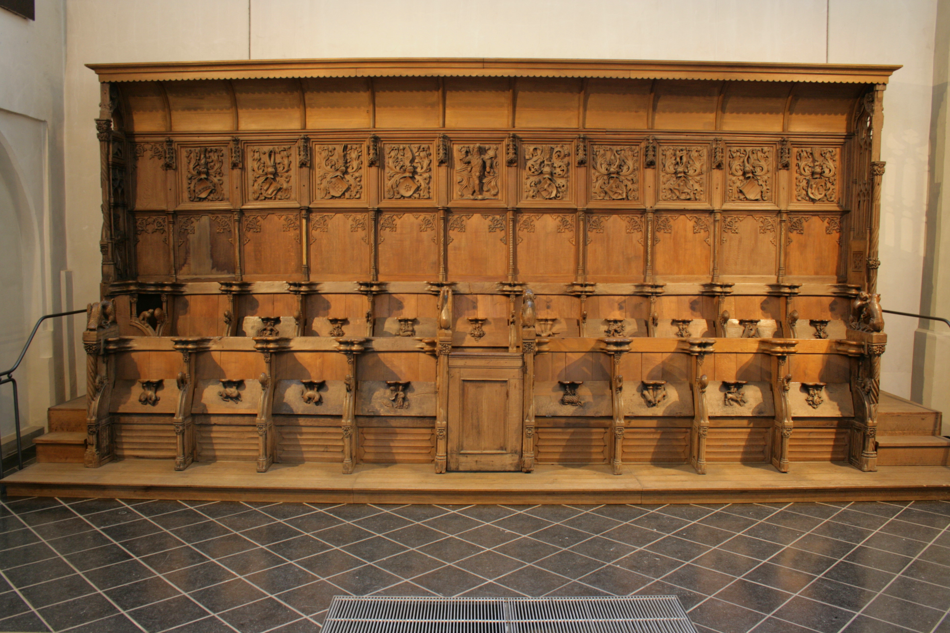 Sankt Martini in Emmerich am Rhein